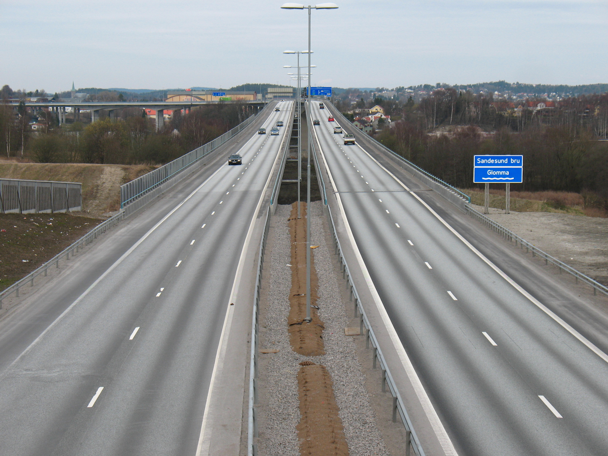 Sandesundbruene (E6) sett fra broen over E6 (FV 521 / Sundløkkaveien), Årum i kommunedel Borge i Fredrikstad mot Alvim i Sarpsborg.